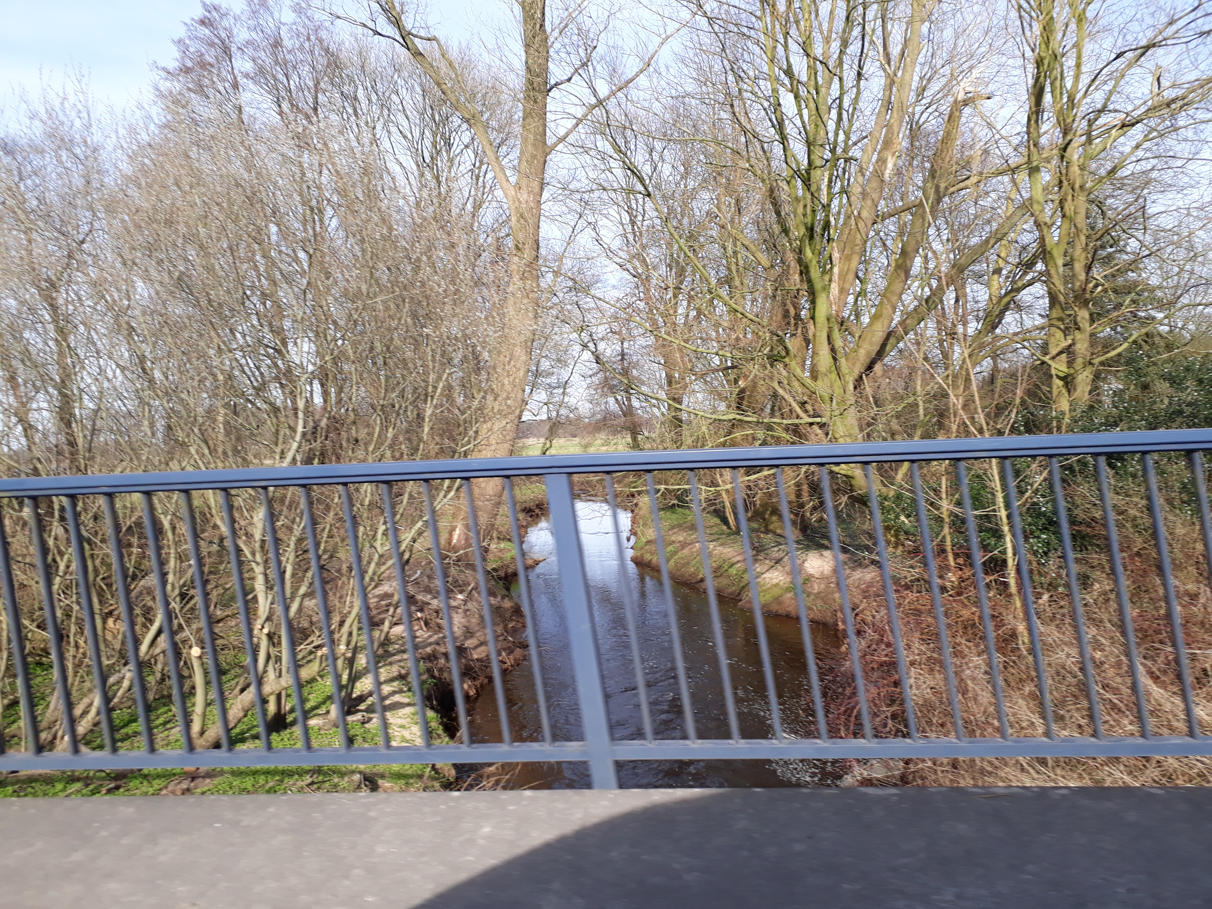 Auebrücke in Kakerbeck, Kreis Stade (Nds.)